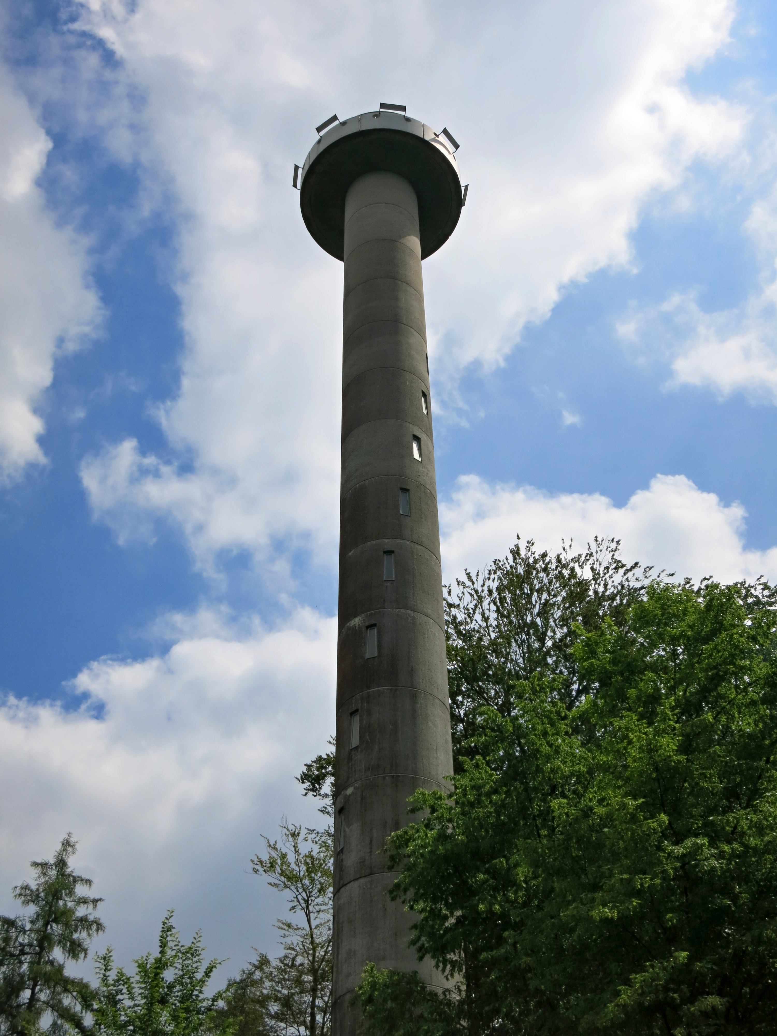 Esterliturm